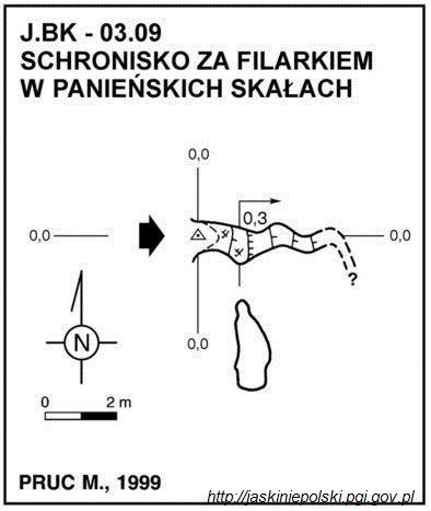 Schronisko za Filarkiem w Panieńskich Skałach